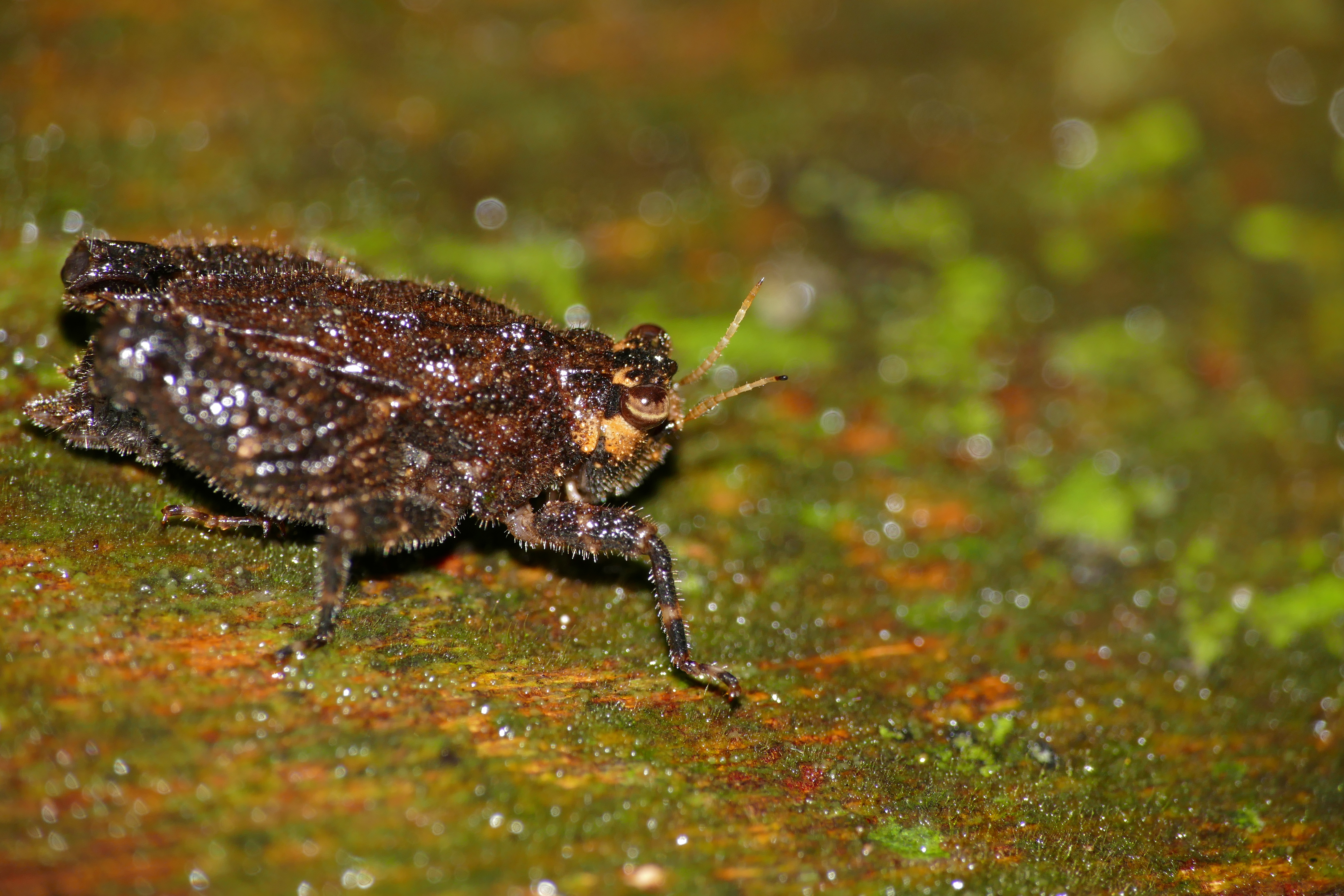 Potua morbillosa in Mulu National Park, Sarawak, MALAYSIA